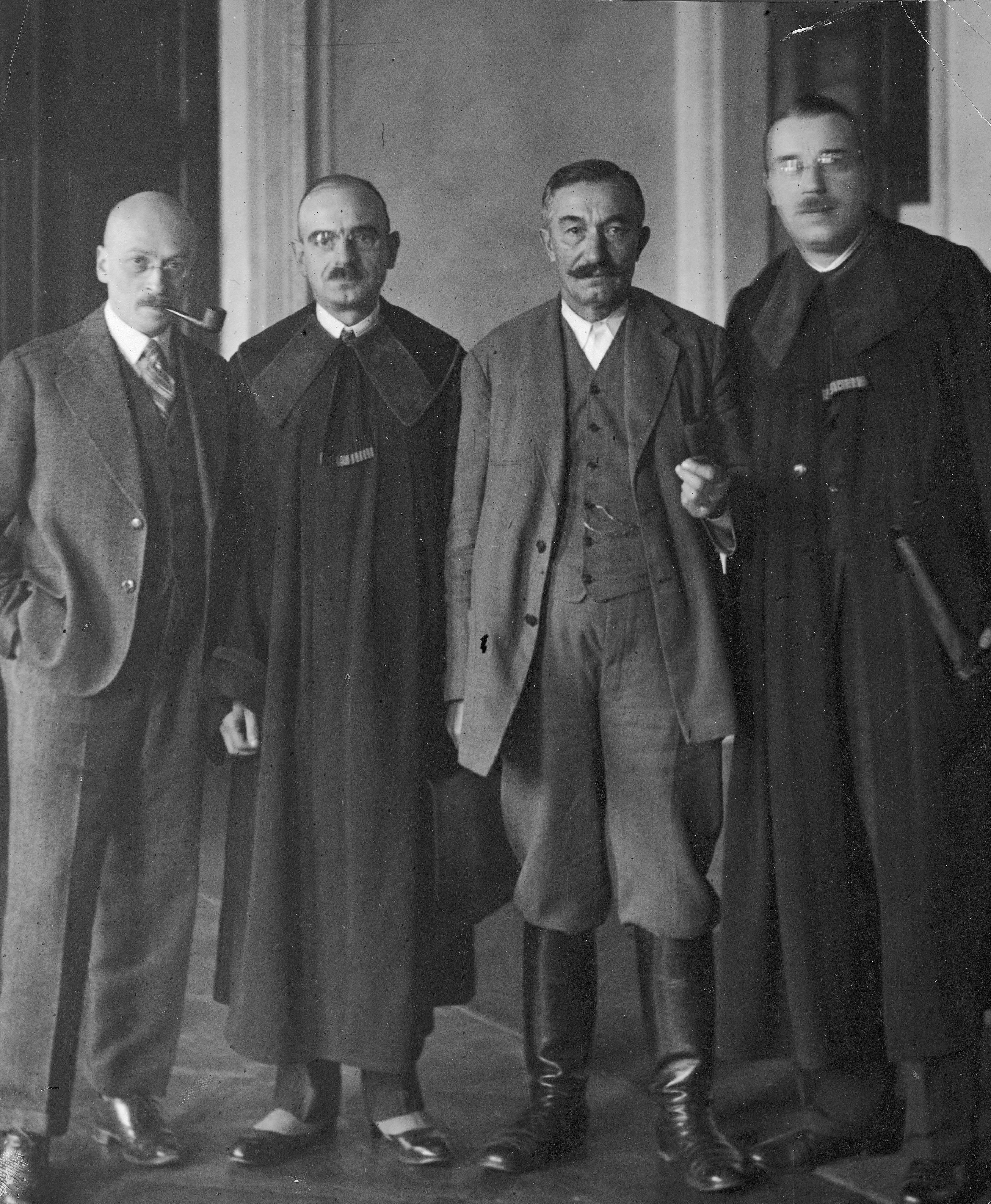 Proces brzeski w Sądzie Okręgowym mieszczącym się w pałacu Paca przy ulicy Miodowej 15 w Warszawie. Oskarżony Adam Pragier, adwokat Aleksander Dębski, oskarżony Wincenty Witos i świadek obrony Józef Chaciński (stoją od lewej) w kuluarach sądowych.